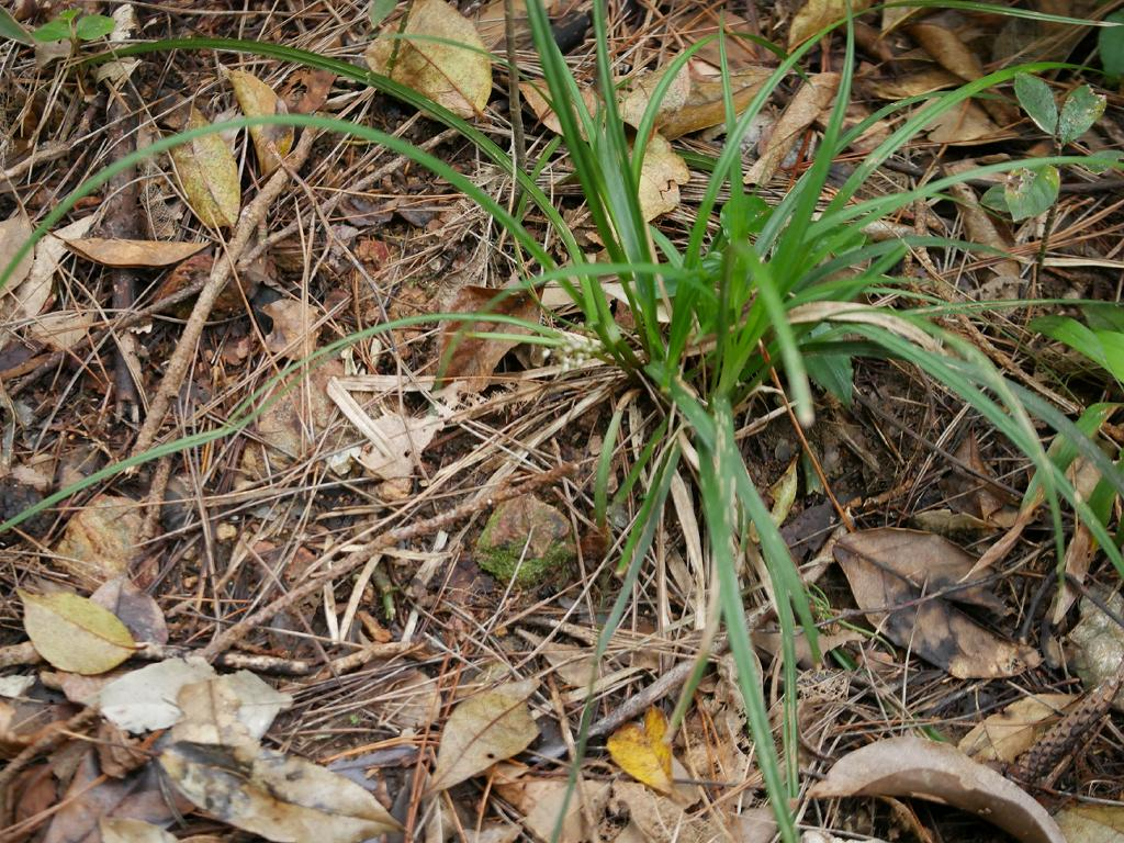 2018/12/30 沖縄本島：Okinawa Island, Japan